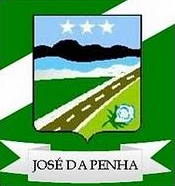 Brasão de José da Penha, Rio Grande do Norte, Brasil